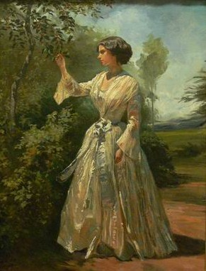 Софья Андреевна Гагарина на прогулке в саду